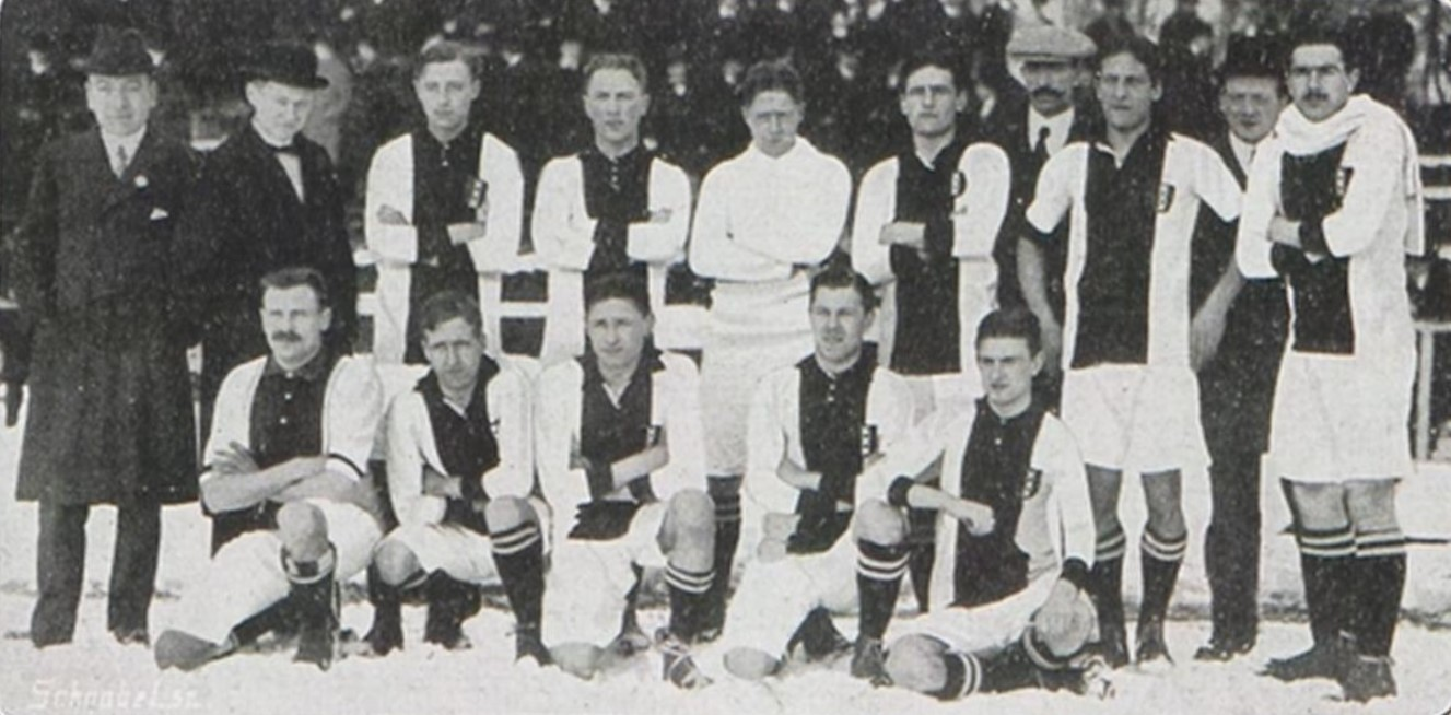 Elftal van Ajax (25 december 1913)V.l.n.r. staand (de spelers): Jan Goosen, Jean Gilissen, Gerard Ziegeler, Nico Buwalda, Cornelis Swarttouw, Jan Schoevaart Zittend v.l.n.r.: Anton Buijen, Sidney Vandenbergh, Theo Brokmann, Wim Willemse, Joop Pelser.